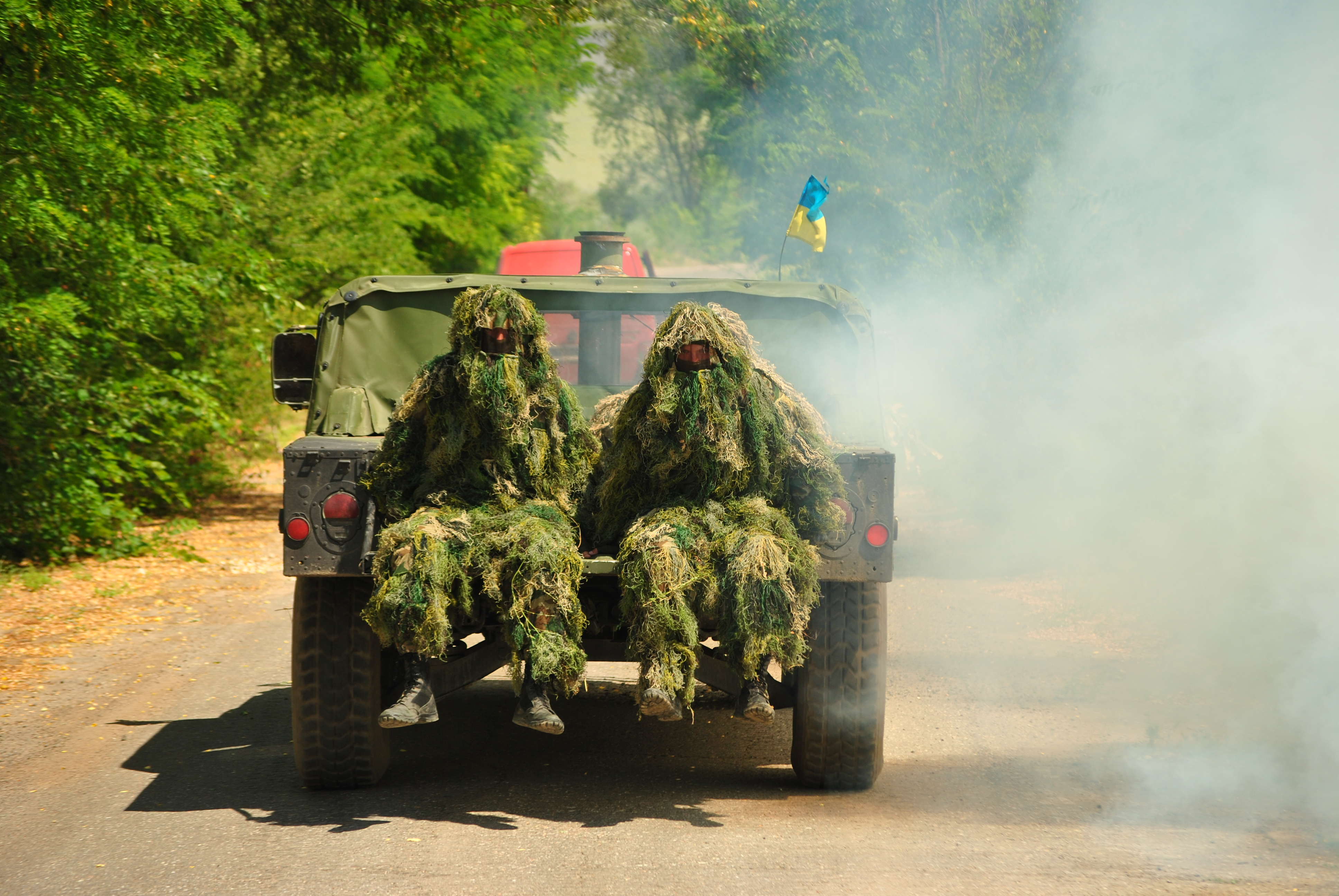 Фото: Дмитрий Удовицкий